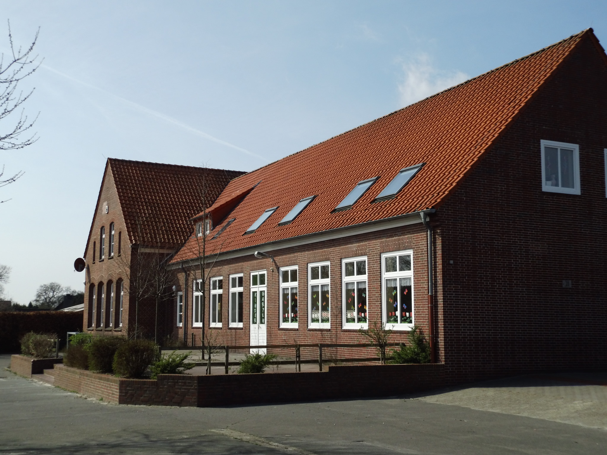 Kindergarten in Ardorf, Ardorf, Stadtteil der Stadt Wittmund, Landkreis Wittmund, Niedersachsen, Deutschland